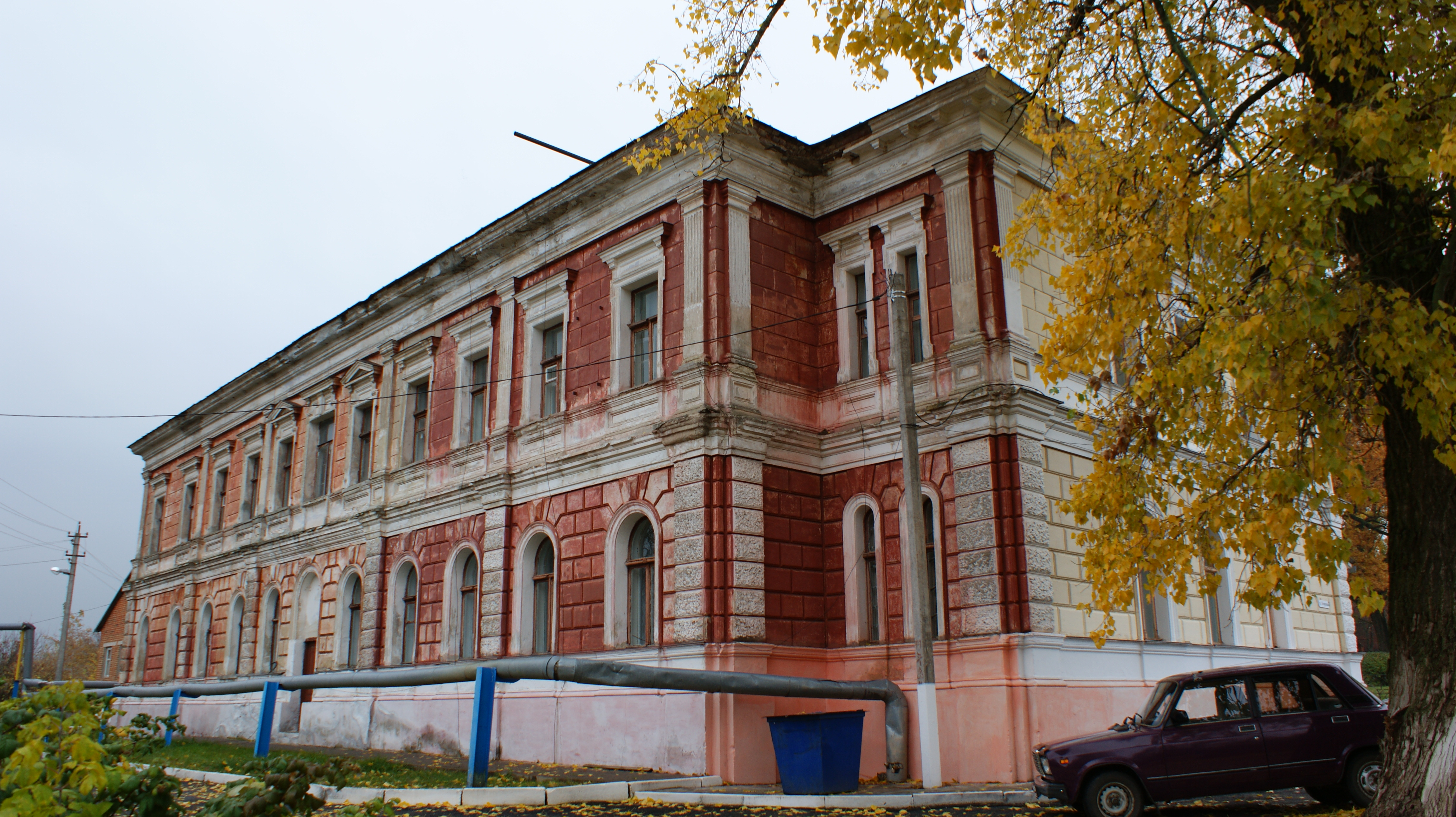 Дом Харитоненко (Белгородская область, Грайворон, посёлок Красная Яруга, Театральная улица, 7)